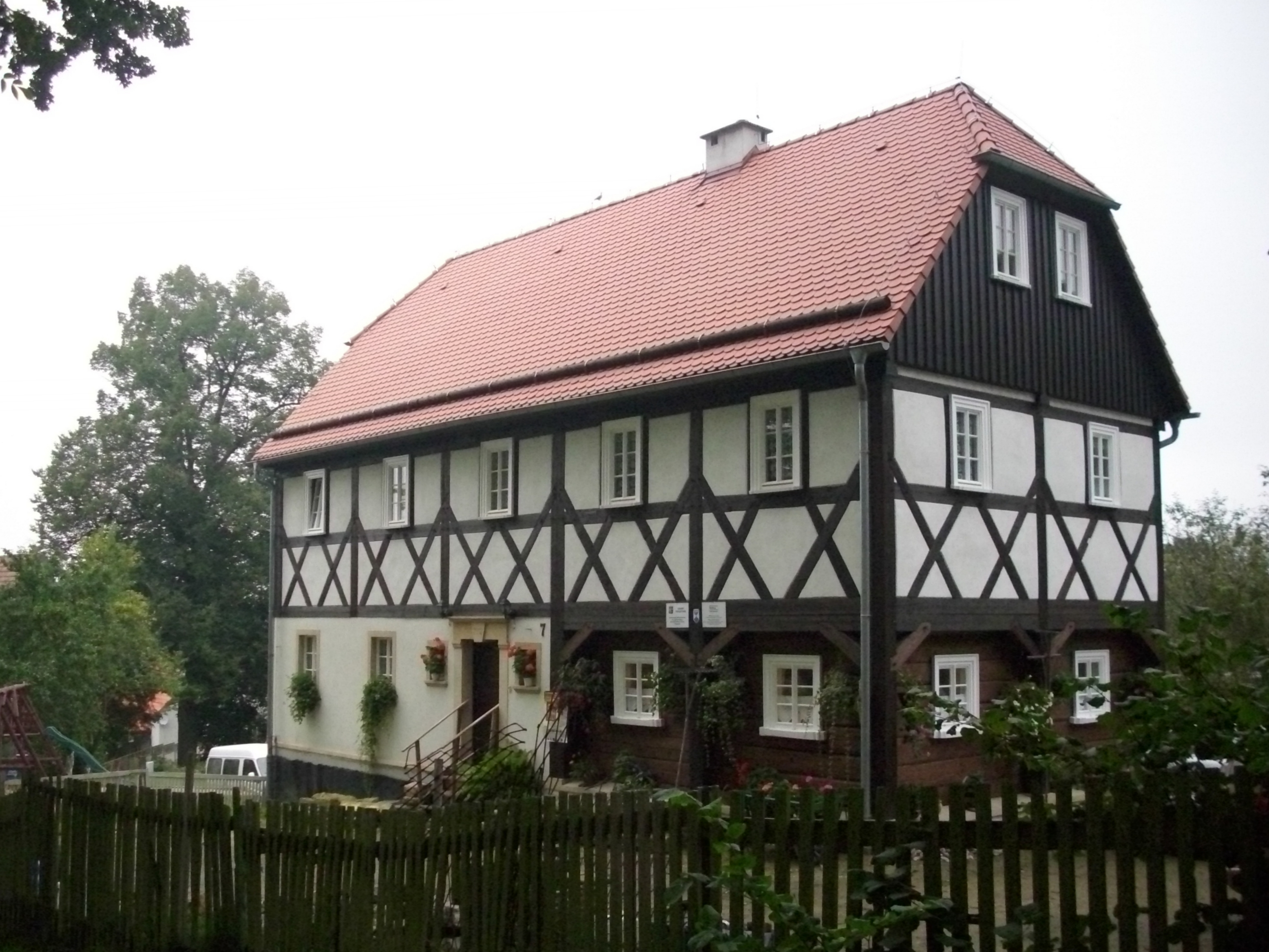 Bogatynia, dom, 1 ćw. XIX, 1920